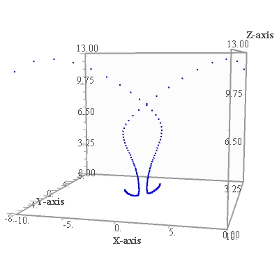 Система Лоренца, r = 0.3